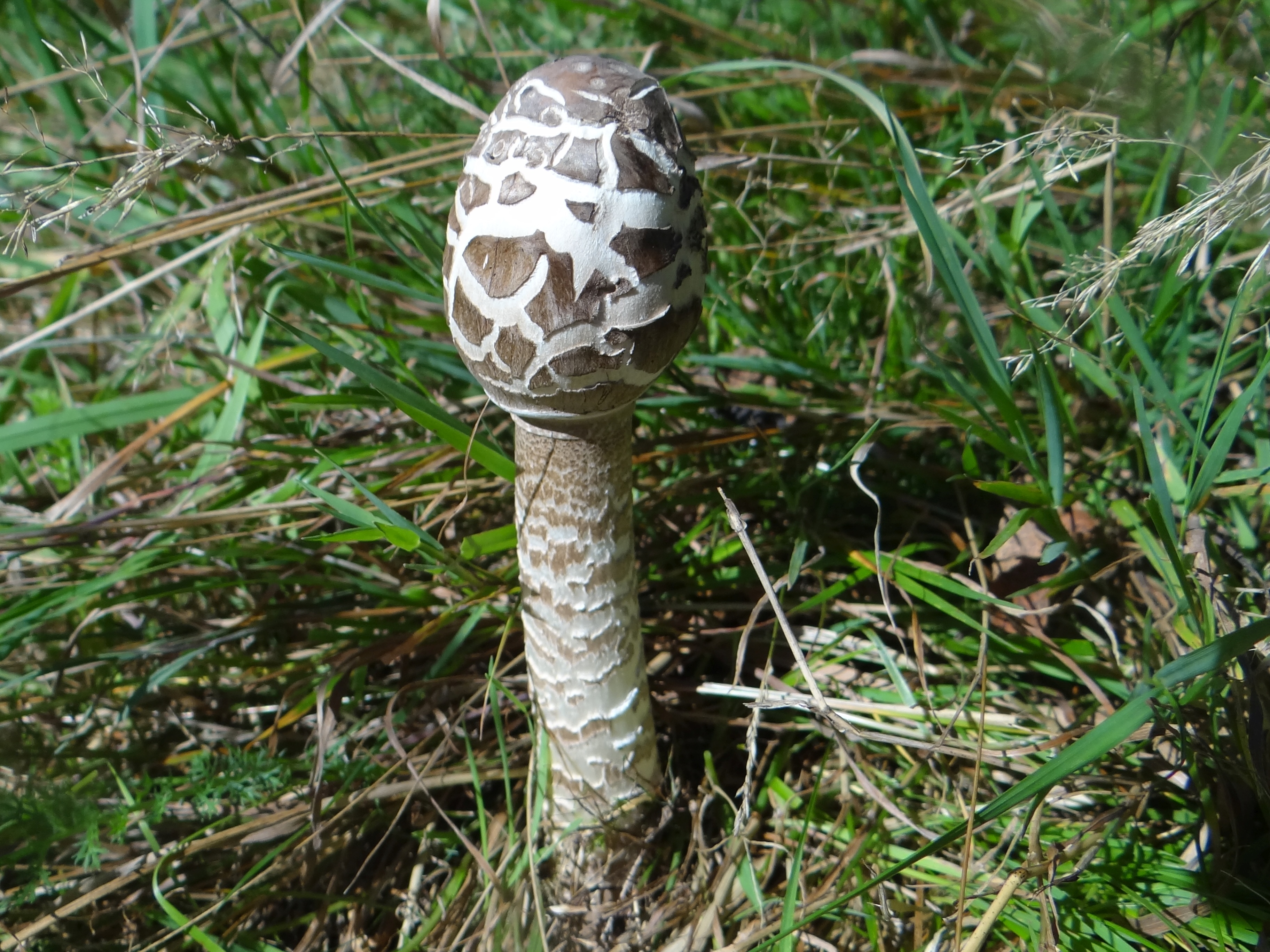 Macrolepiota procera. Location: Poland, Żegocina